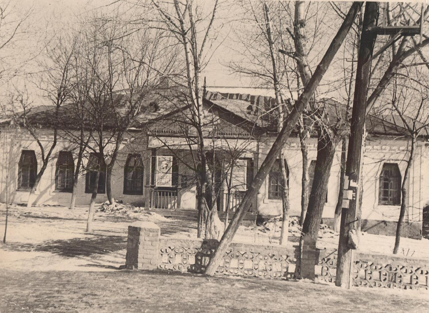 приміщення